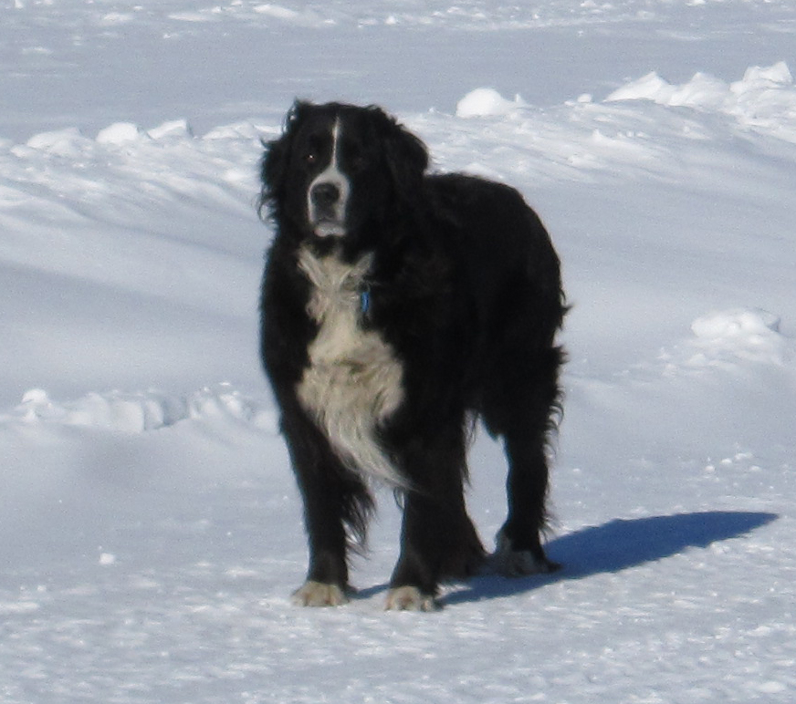 Femelle Labernois